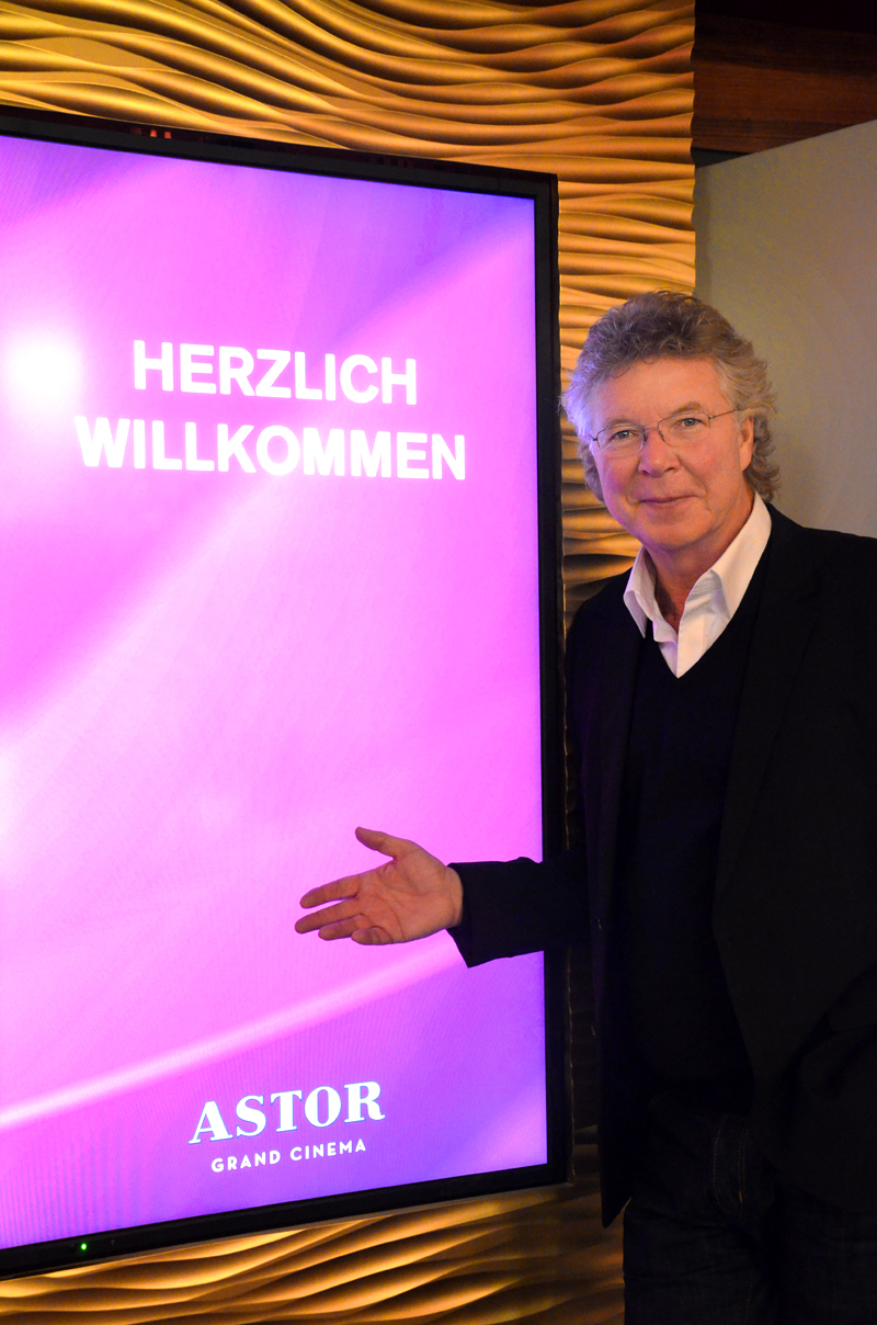 Schon am Tag vor der offiziellen Eröffnung von Deutschlands erstem Premium Multiplex-Kino Astor Grand Cinema am 3. Dezember 2014 in Hannover hieß der Ideengeber und Kino-Betreiber Hans-Joachim Flebbe erste Pressefotografen "Herzlich Willkommen" ...